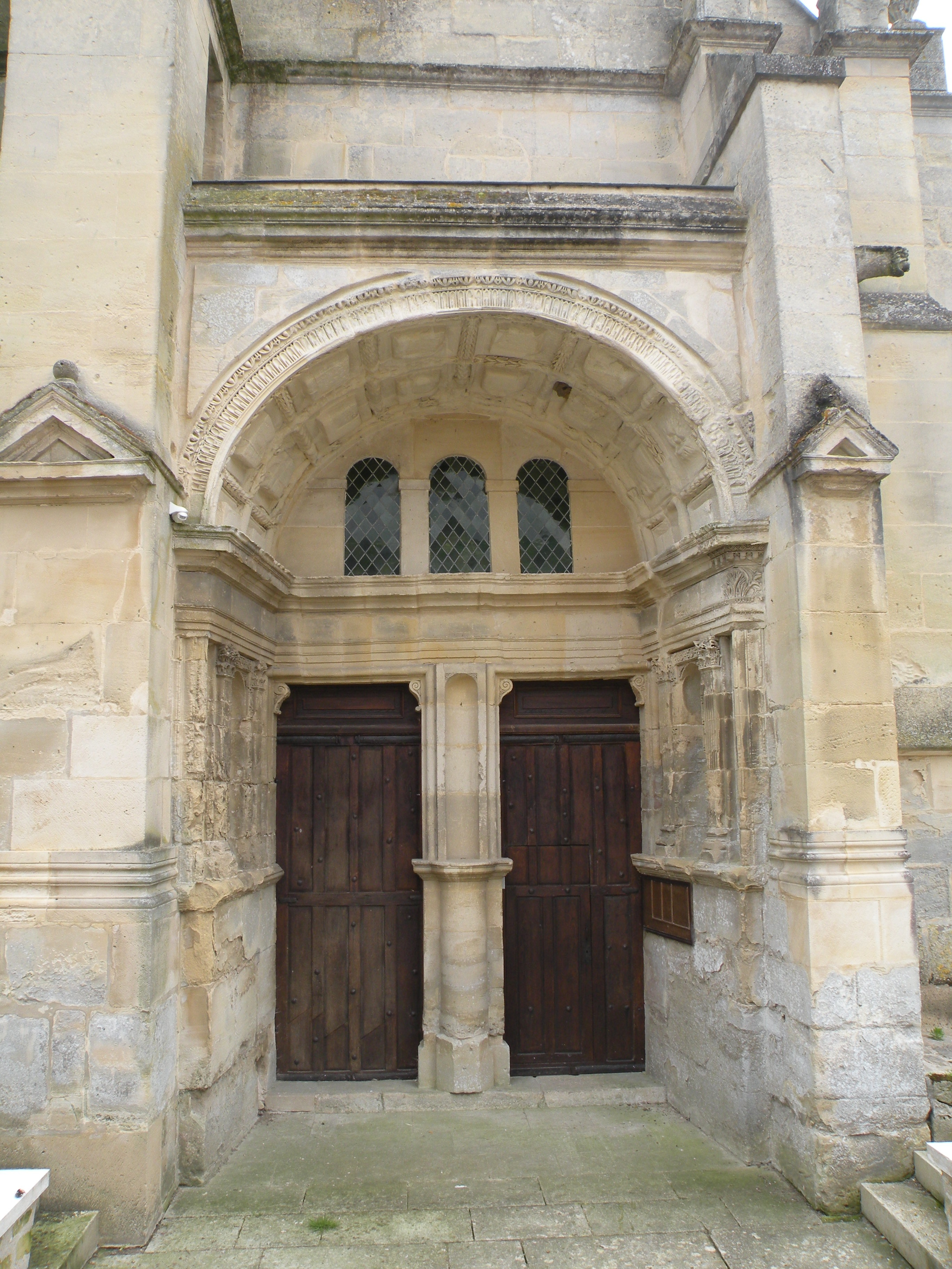 portail Église Saint-Nicolas de Guiry-en-Vexin